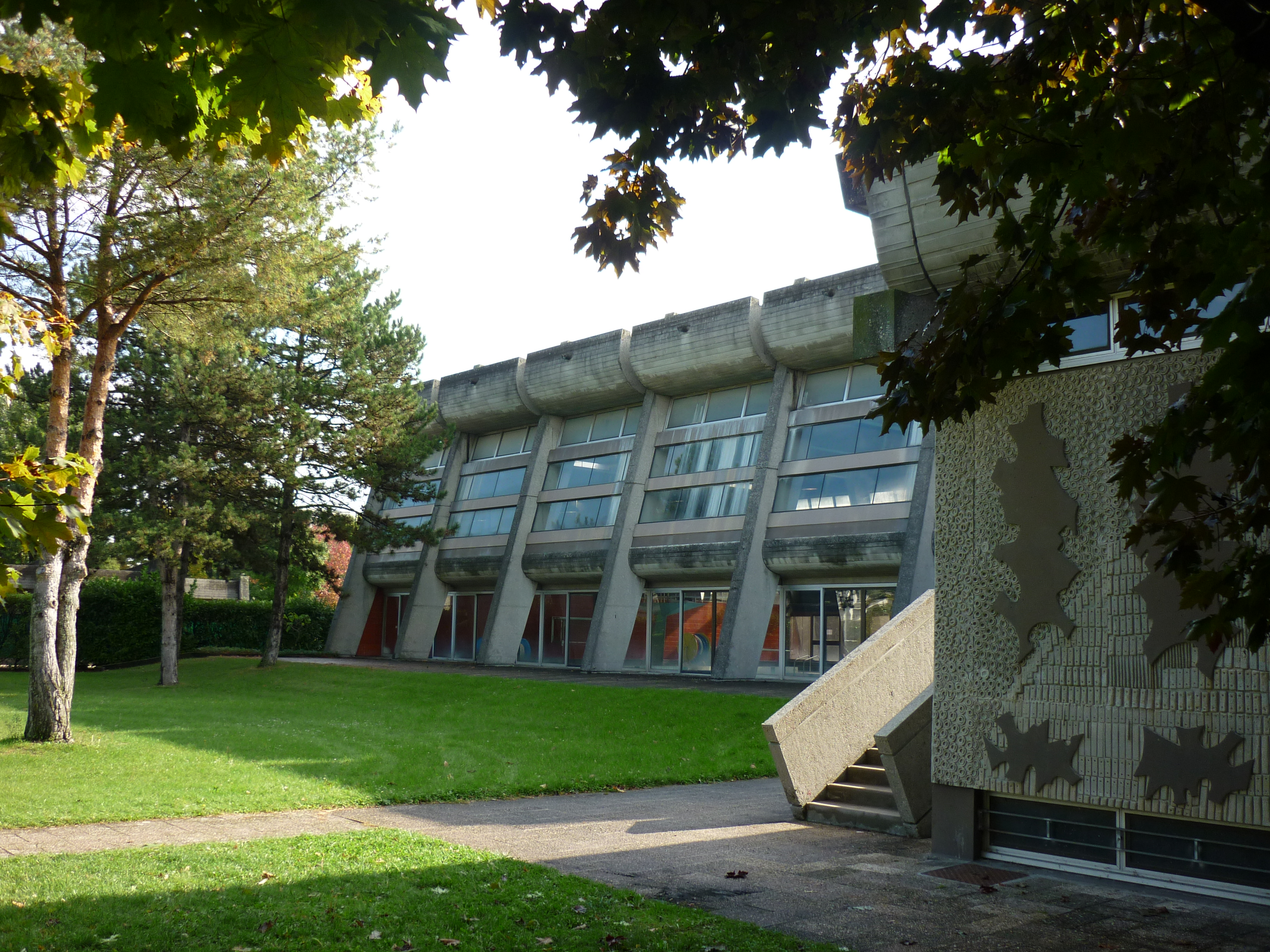 Ecole nationale des travaux publics de l'Etat (ENTPE), 10/2009